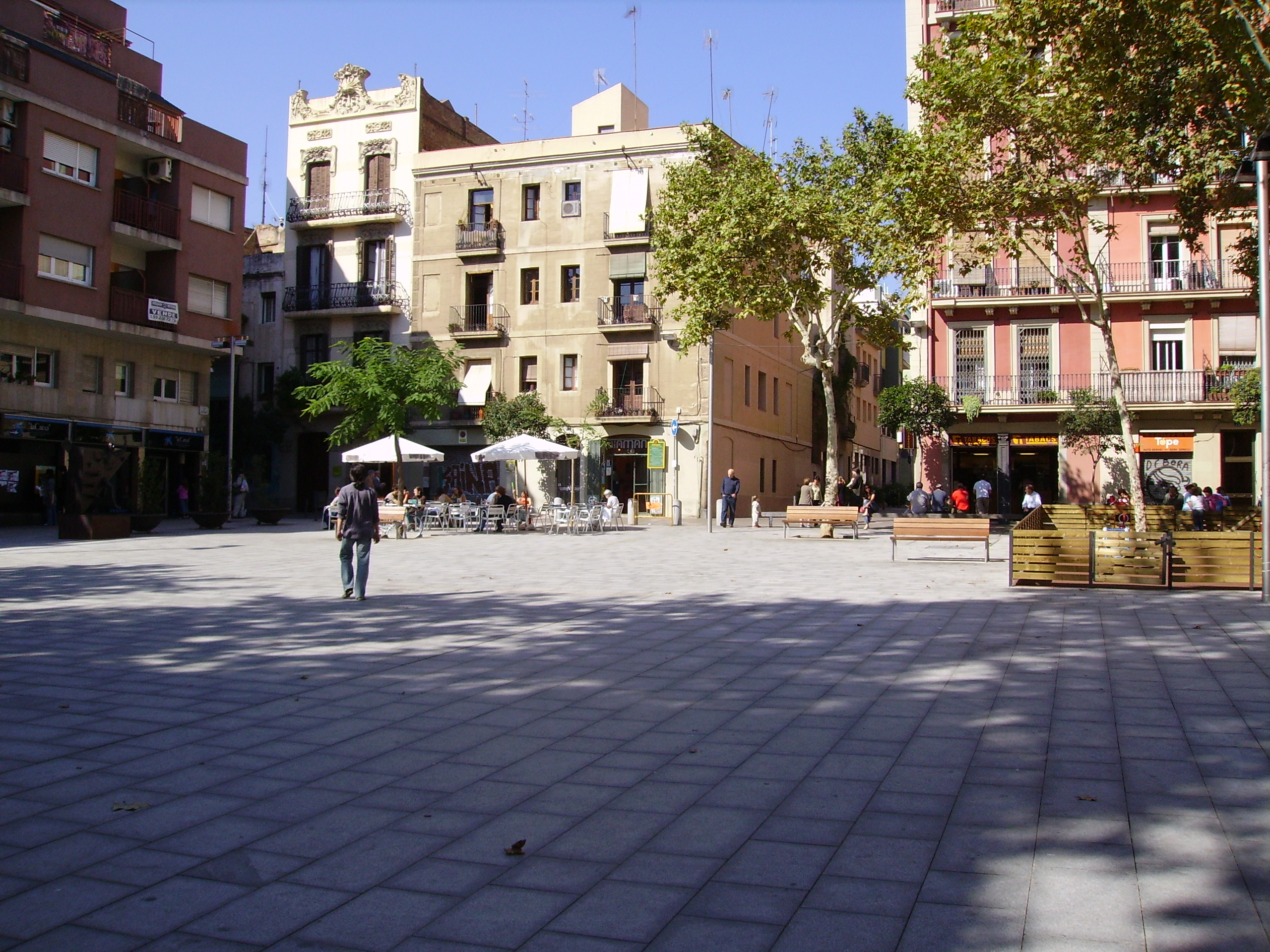 Plaça del Diamant, al barri de Gràcia de Barcelona.